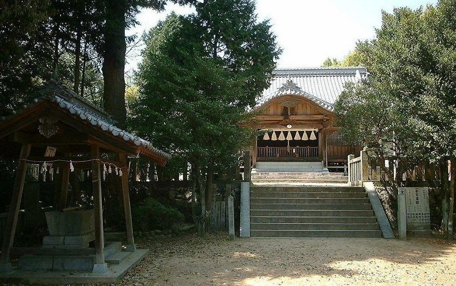 岩清水八幡宮、以前はここが札所だった